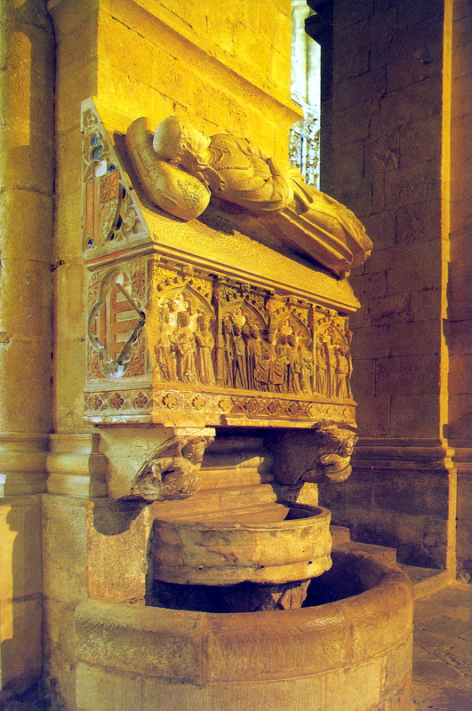 Sepulcre de Joana d'Aragó, comtessa d'Empúries, al monestir de Poblet, per Jordi de Déu, c. 1385-1390